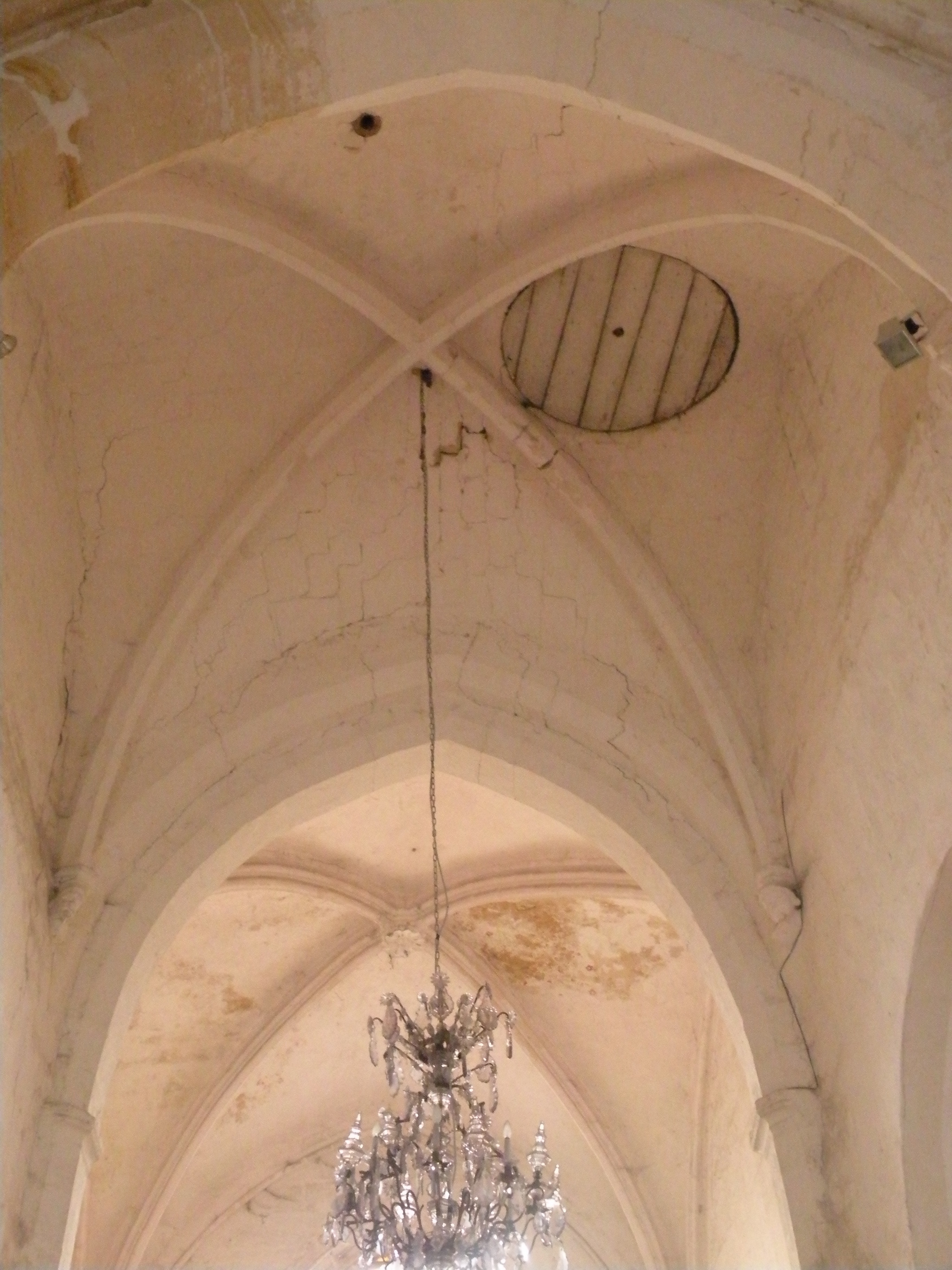 Intérieur de l'église Saint-Pierre-Saint-Paul d'Arronville